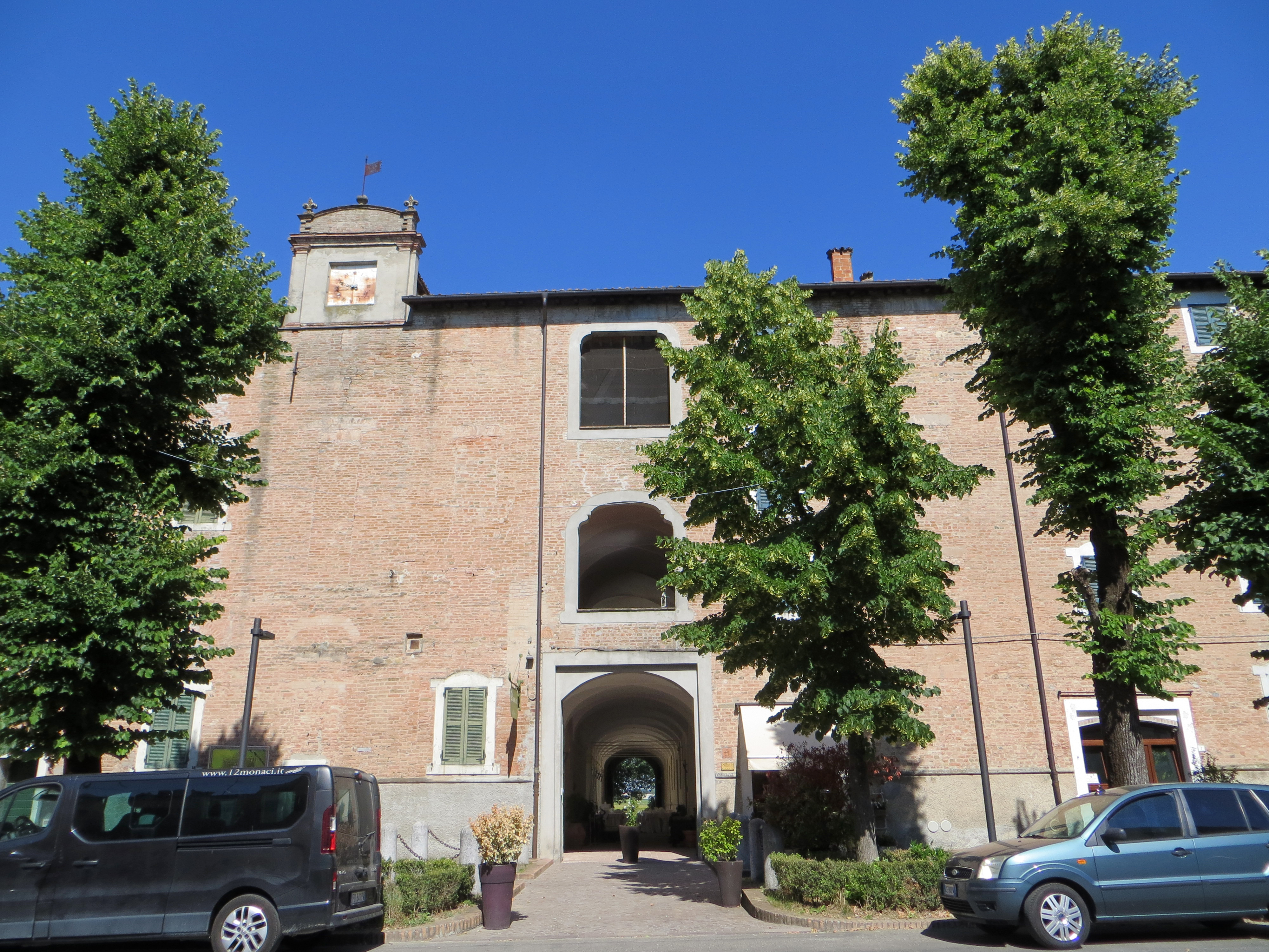 Abbazia di San Bernardo (Fontevivo) - facciata dell'abbazia